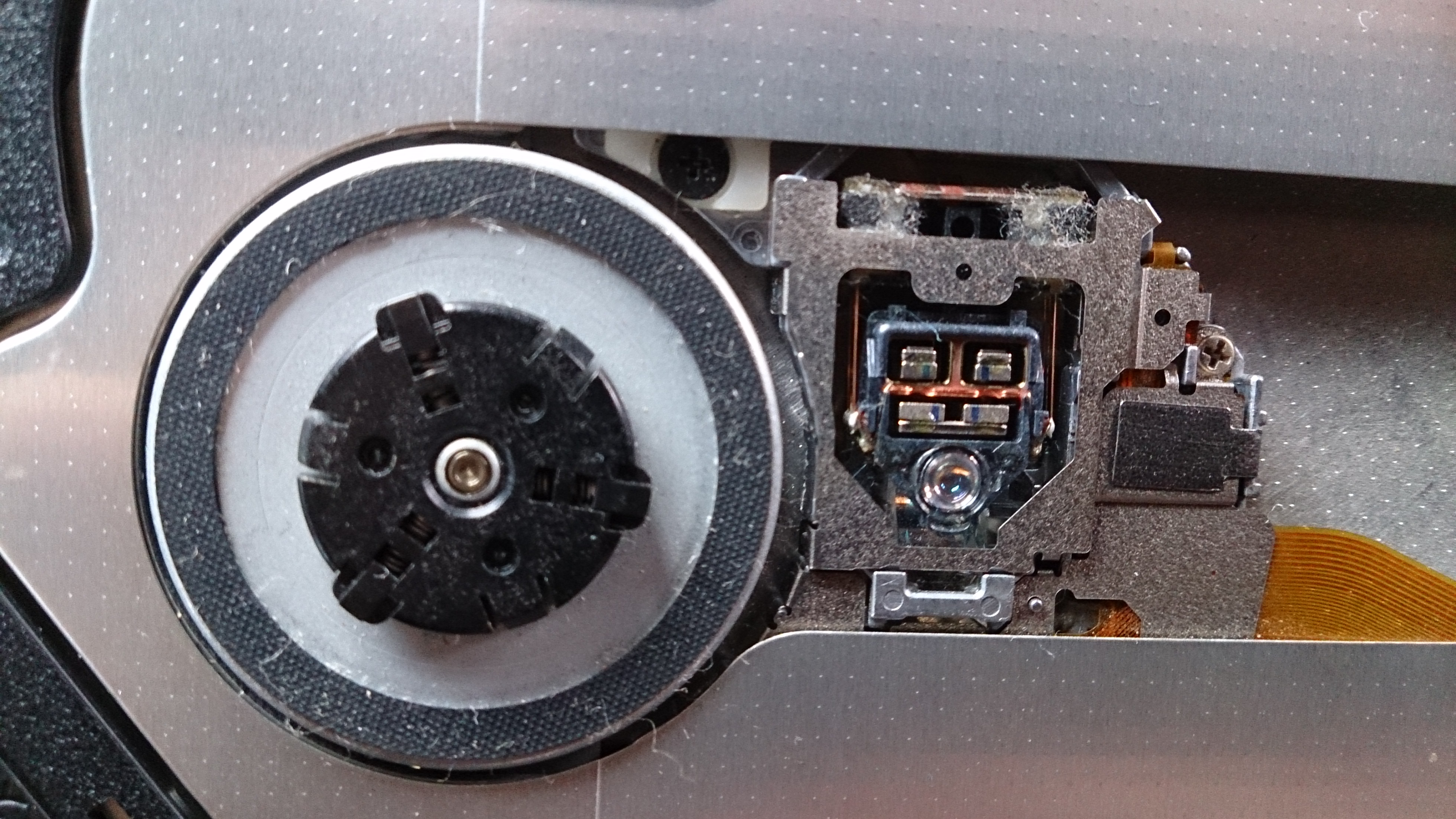 Laserový snímač